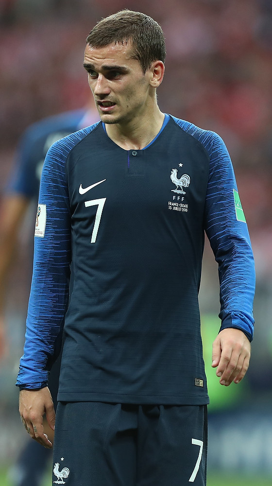 Уилл Смит, Гризманн, Модрич и кубок мира - в Москве прошёл финал ЧМ-2018